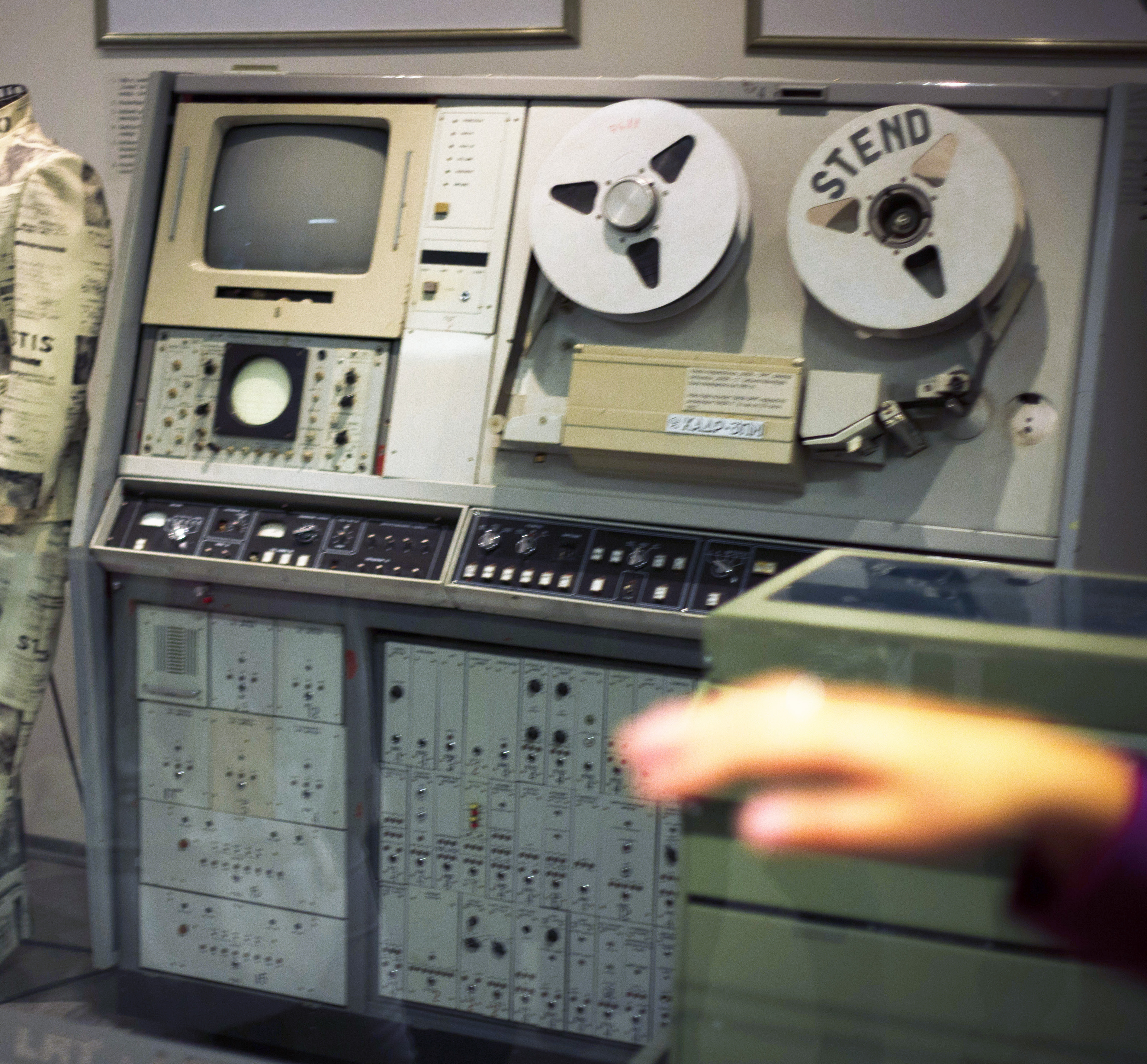 Erwin Verbruggen